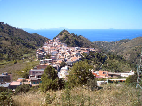 veduta panoramica di Salice